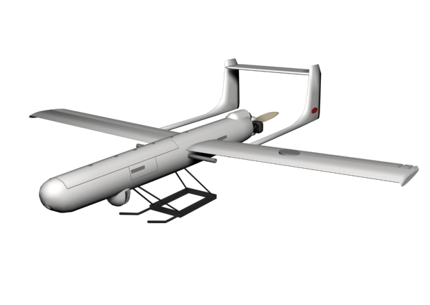 Ghods Mohajer-2